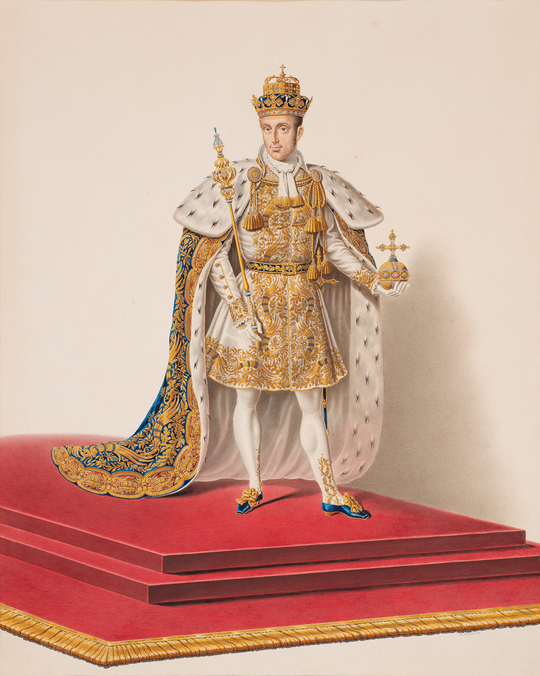 Kaiser Ferdinand I. von Österreich im lombardo-venezischen Krönungsornat. A. Weißenböck; Wien, um 1838. Aquarell. Inv. Nr. XIV B 43.